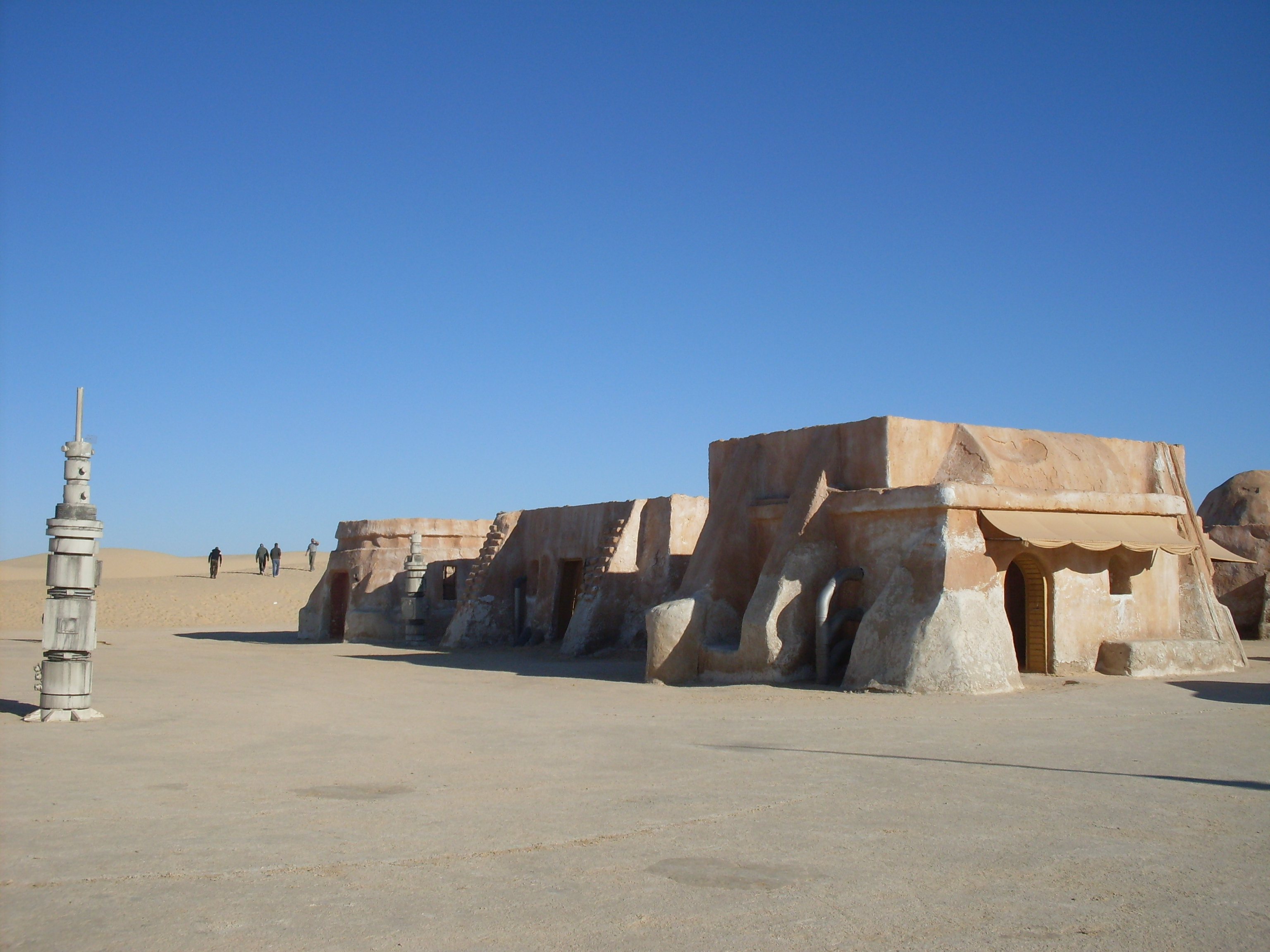 Tunisie: décor de Star Wars aux environs de Tozeur